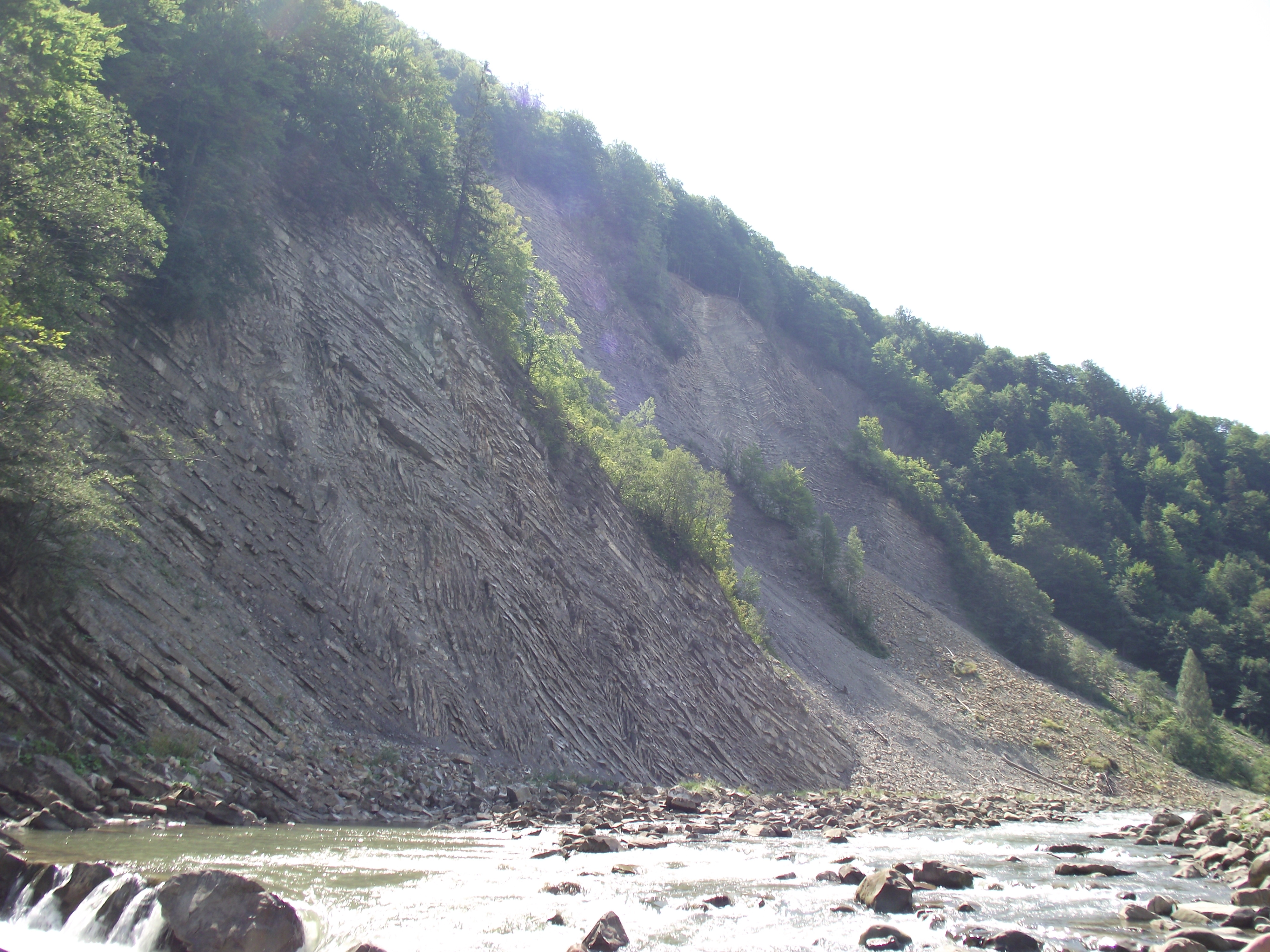 Вид на "Слон" с дикого пляжа